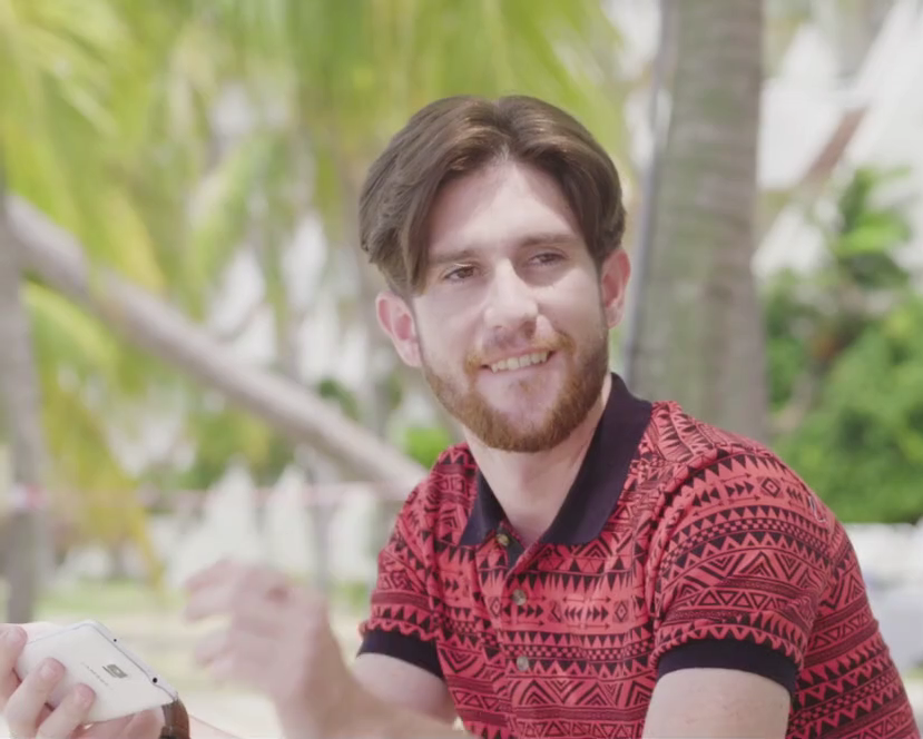 Mat Dan pada tahun 2017